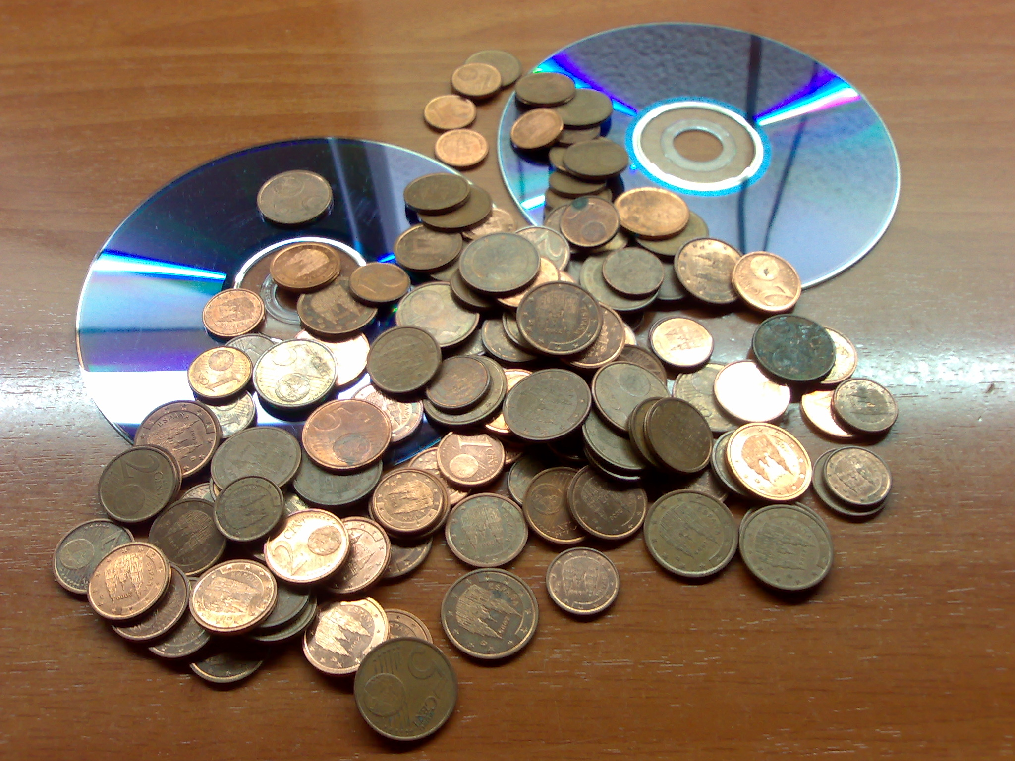 Discos compactos y céntimos de euros, en una alusión a la Sociedad General de Autores y Editores